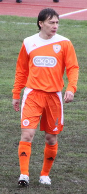 Руслан Балтиев